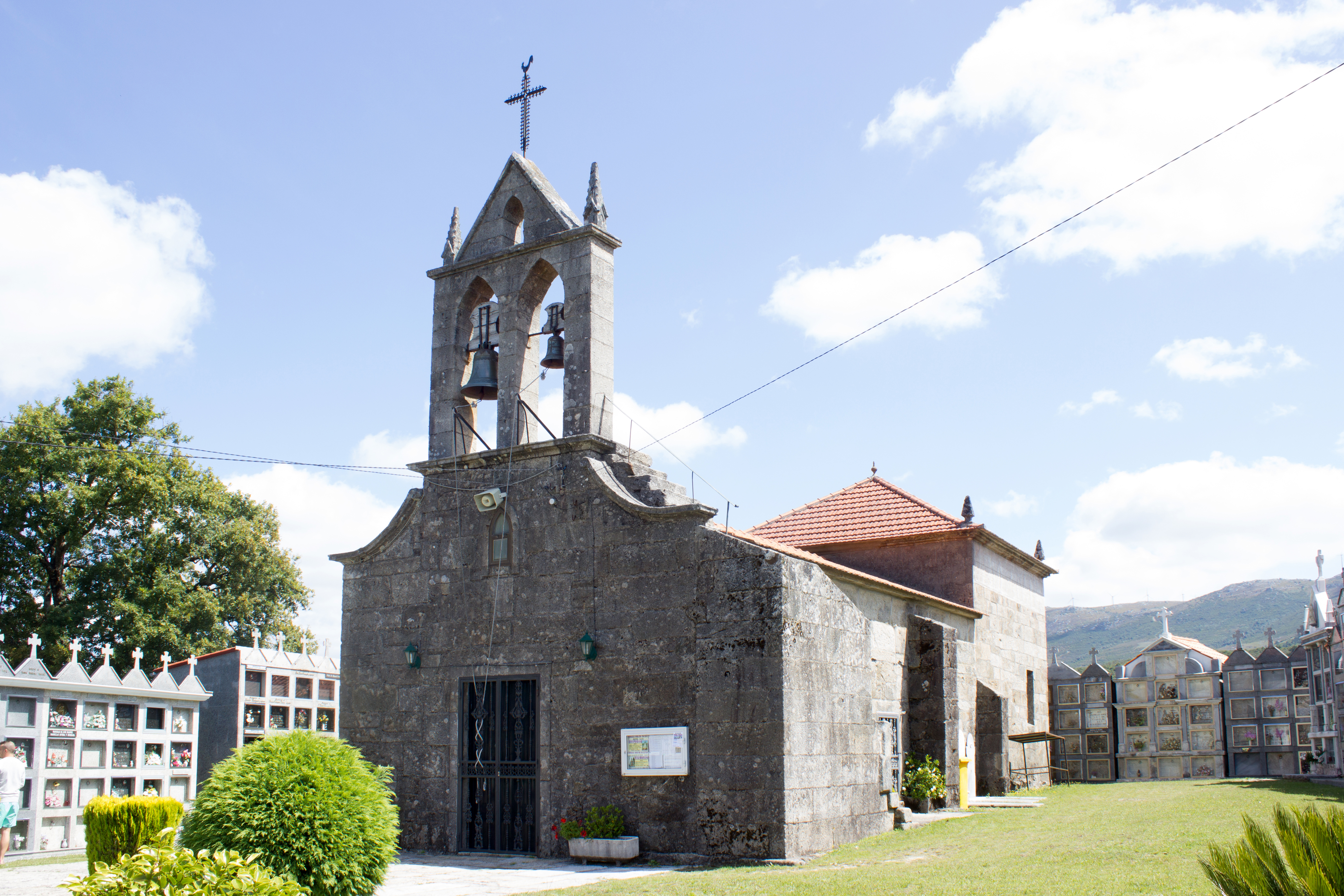 Igrexa de Santa María de Godóns, no concello de Covelo.